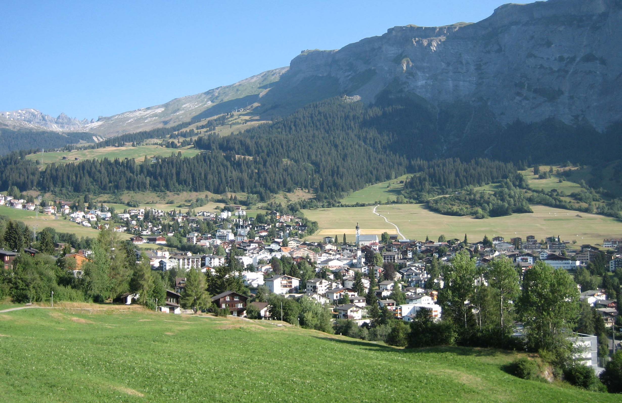 Flims